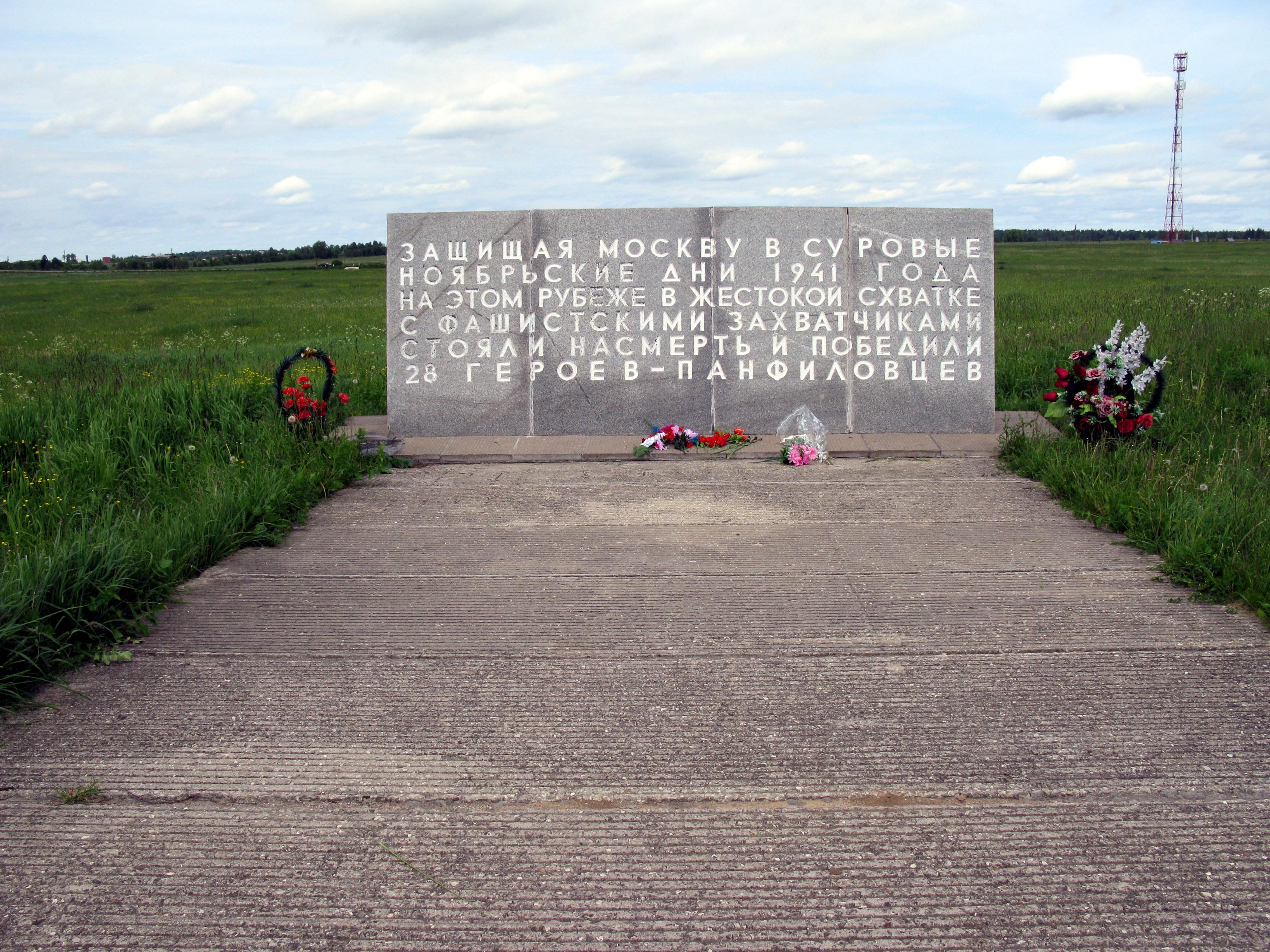 Volokolamsk - Dubosekovo